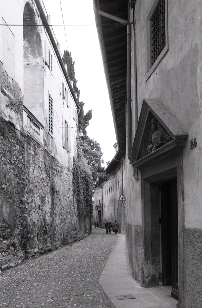 Servizio fotografico : Bergamo, 1980 / Paolo Monti. - Strisce: 7, Fotogrammi complessivi: 36 : Negativo b/n, gelatina bromuro d'argento/ pellicola ; 35 mm. - ((Sul portanegativi: N[I]K[MA]T-EL FP4. - Confronta scheda 3459Lpbn02A-37A. - Occasione: Documentazione per la pubblicazione: Fumagalli Alberto, "Bergamo: origini e vicende storiche del centro antico", Milano, Rusconi immagini, 1981. - Fonte: Agenda di Paolo Monti: Nikon Leika 3001-/ Monti 1978 (1978-1982), presso Archivio Paolo Monti. - Fonte: Fattura di Paolo Monti: IV. Commesse/ Fattura n. 15/ Vostro volume illustrato Bergamo Alta (1980/05/18), presso Archivio Paolo Monti. Servizio fotografico in b/n per le illustrazioni del volume. Alla Società Rusconi vengono ceduti tutti i diritti di riproduzione anche per le eventuali coedizioni estere. - Fonte: Monografia di Fumagalli, Alberto: Bergamo: origini e vicende storiche del centro antico, Milano, Rusconi immagini (1981)